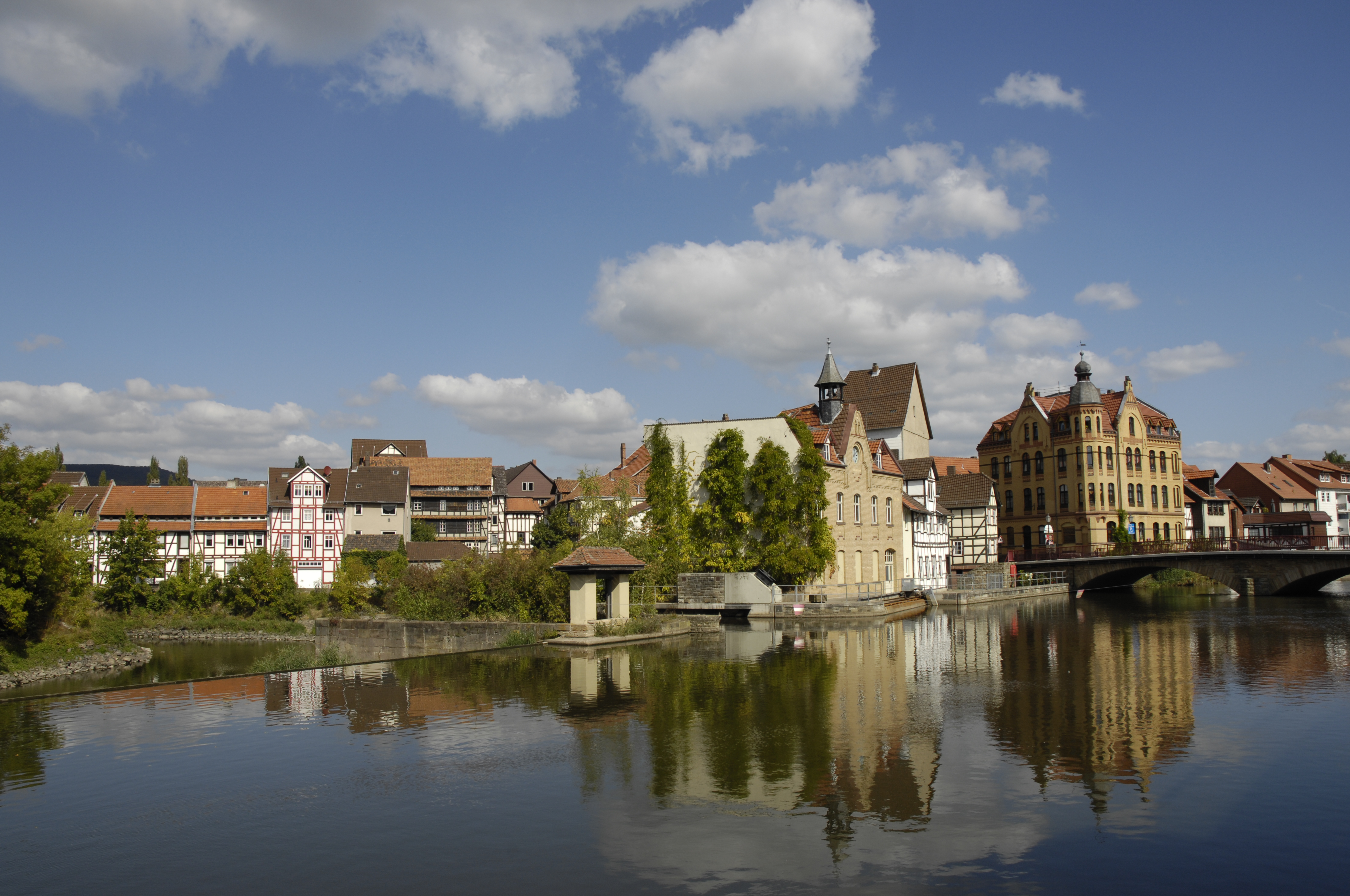 Eschwege, Wasserflächen an der Werra prägen das Stadtbild